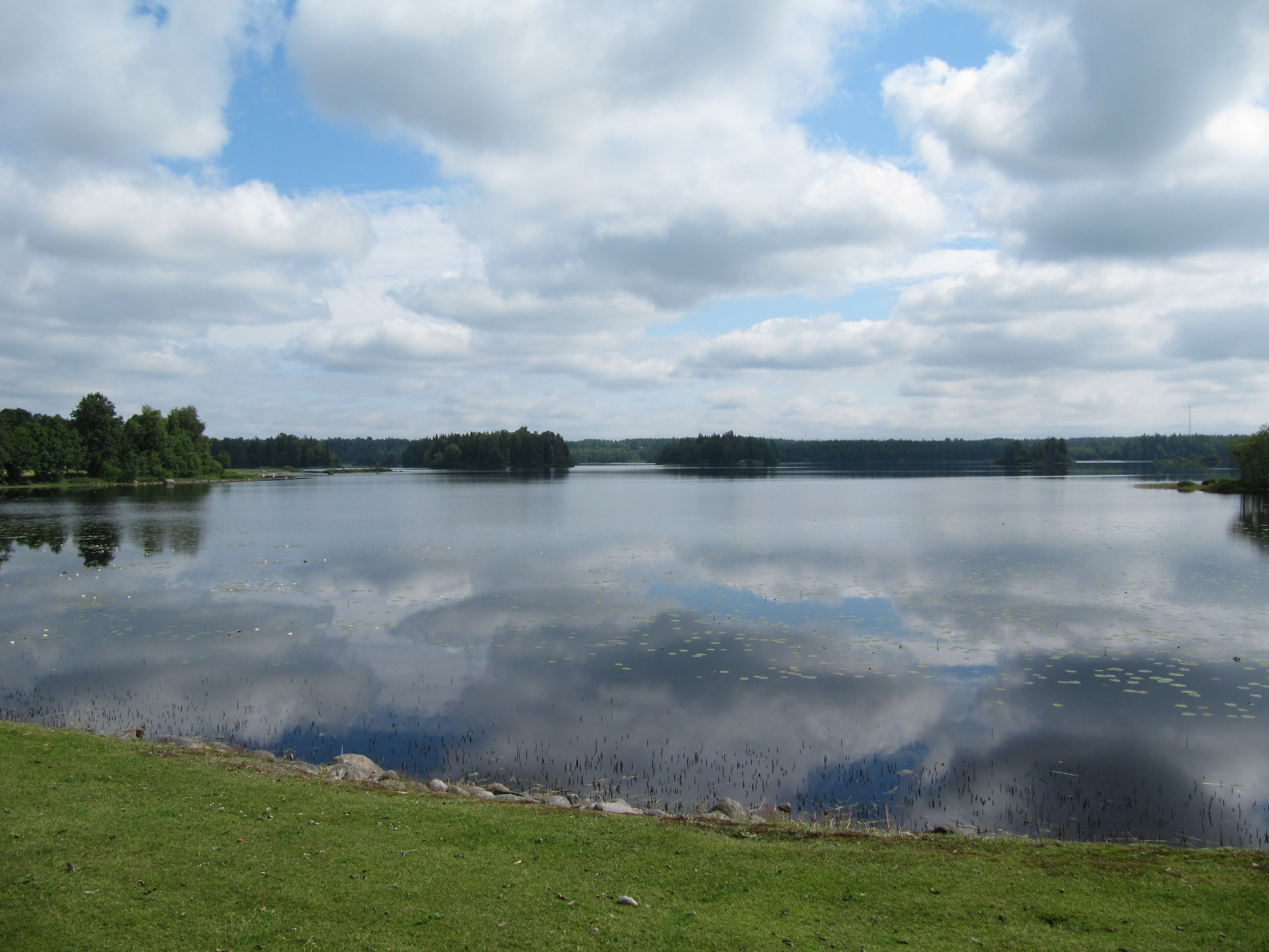 Norra änden av sjön Stråken nära Aneboda kyrka.